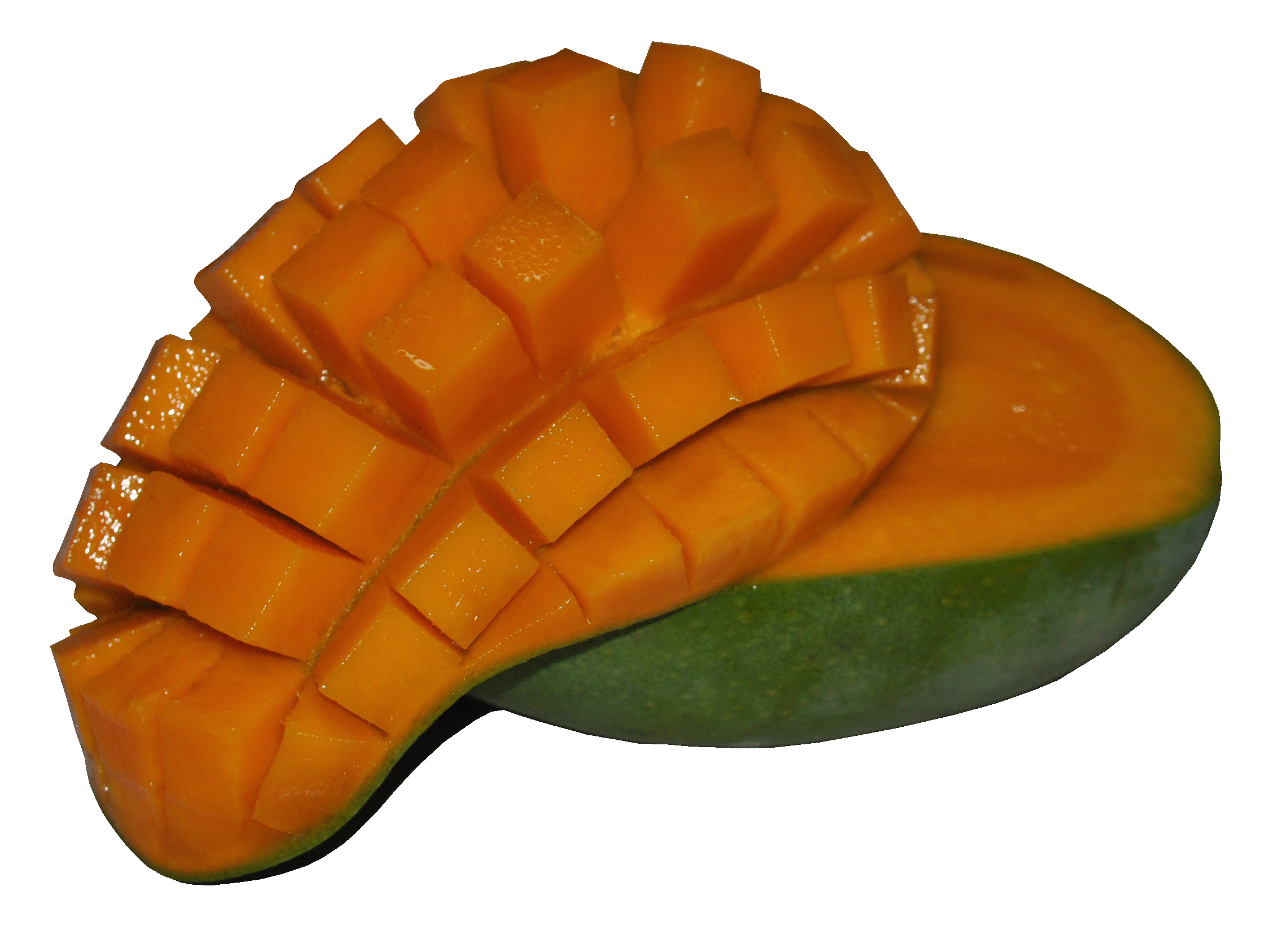 Harumanis